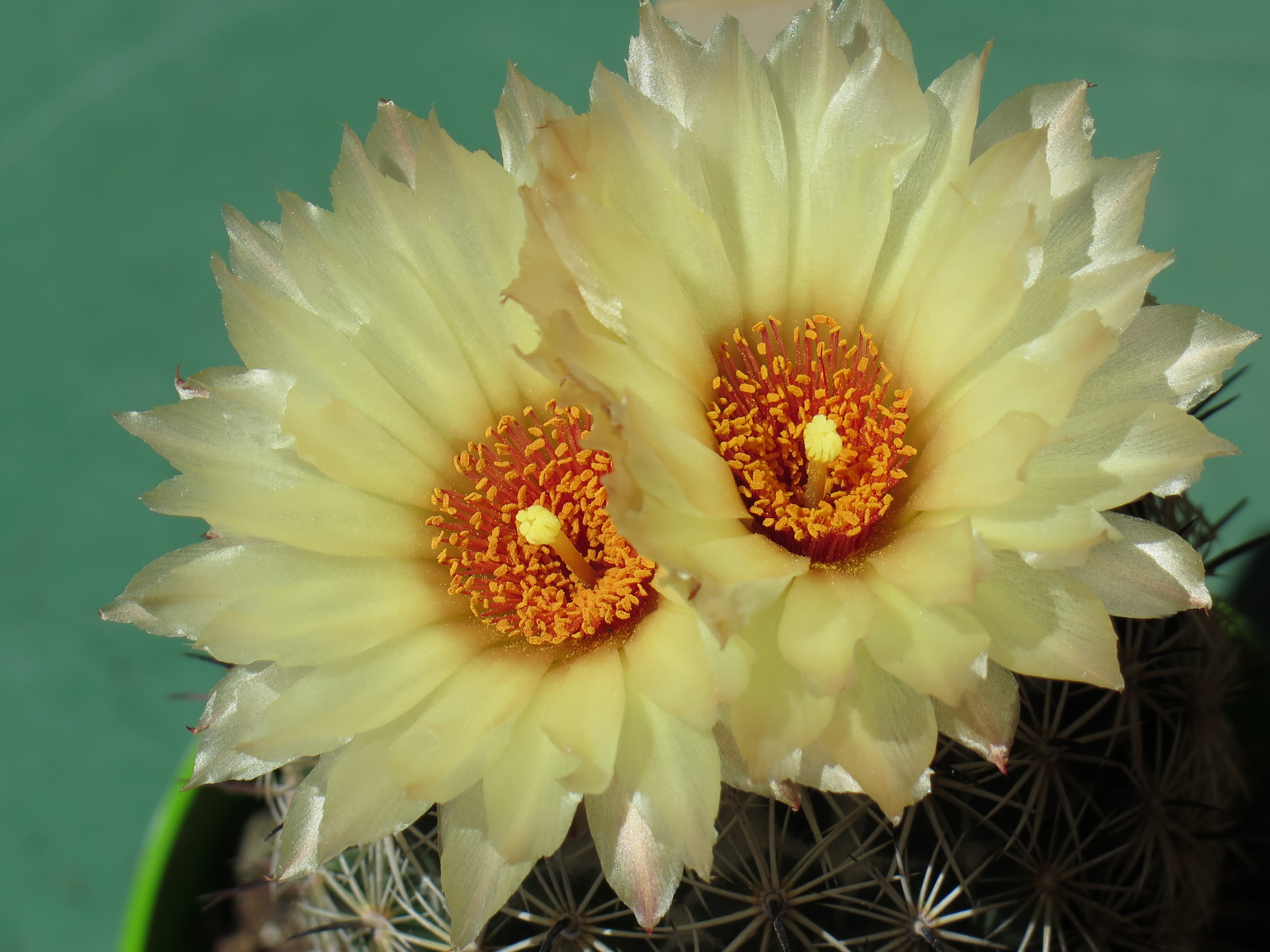 I fiori della coryphantha cornifera